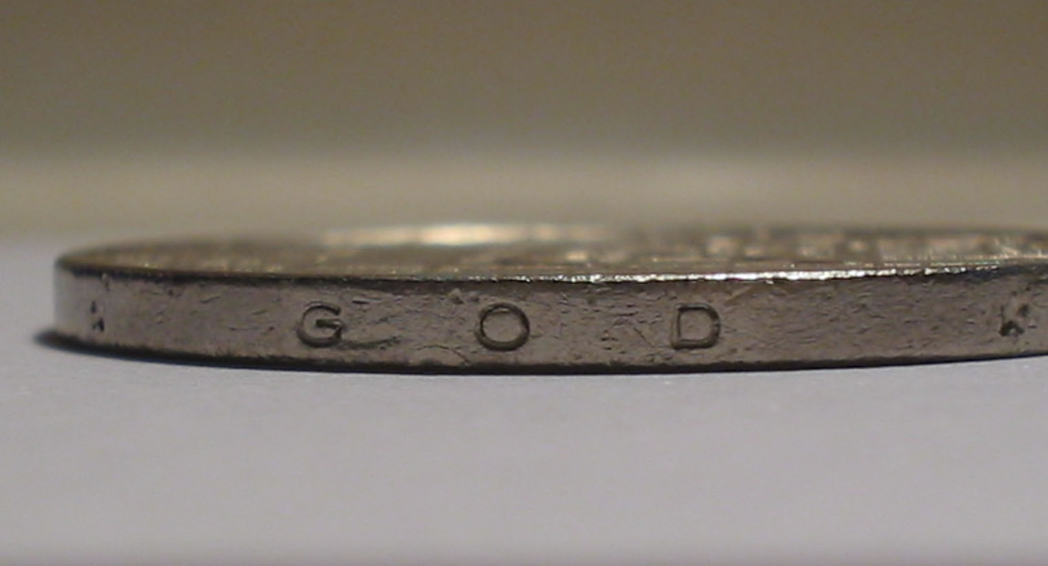 stukje Randschrift rijksdaalder (*G O D*)